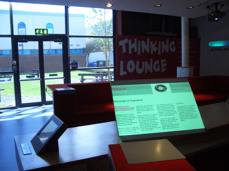 Sellafield Visitors' Centre